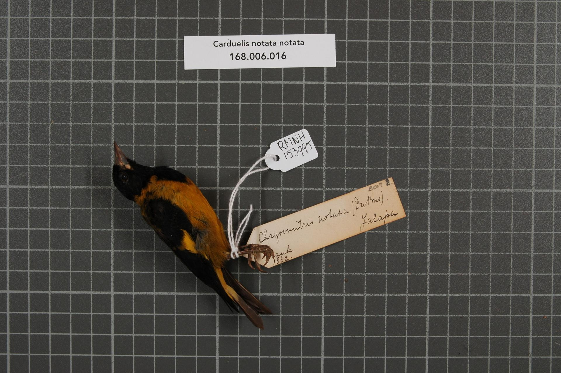 Carduelis notata notata Du Bus, 1847